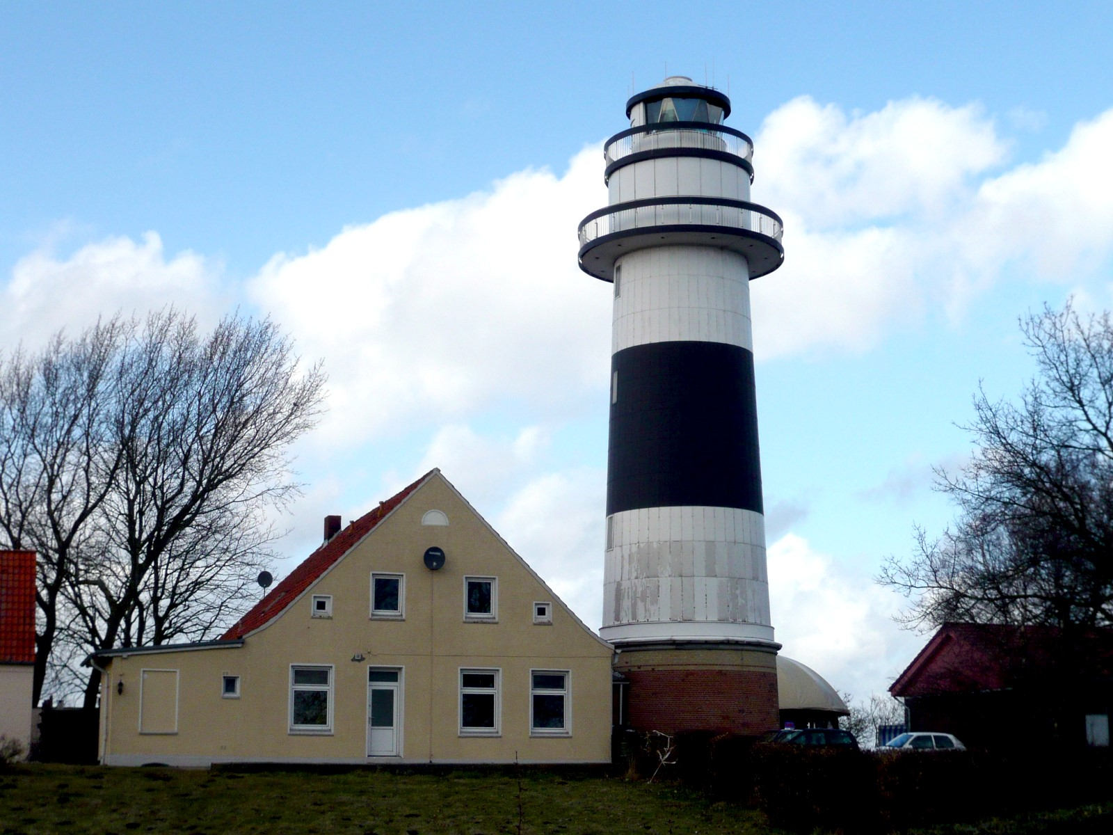 Leuchtturm Bülk mit dem ehem. Wohngebäude des 1. Wärters.